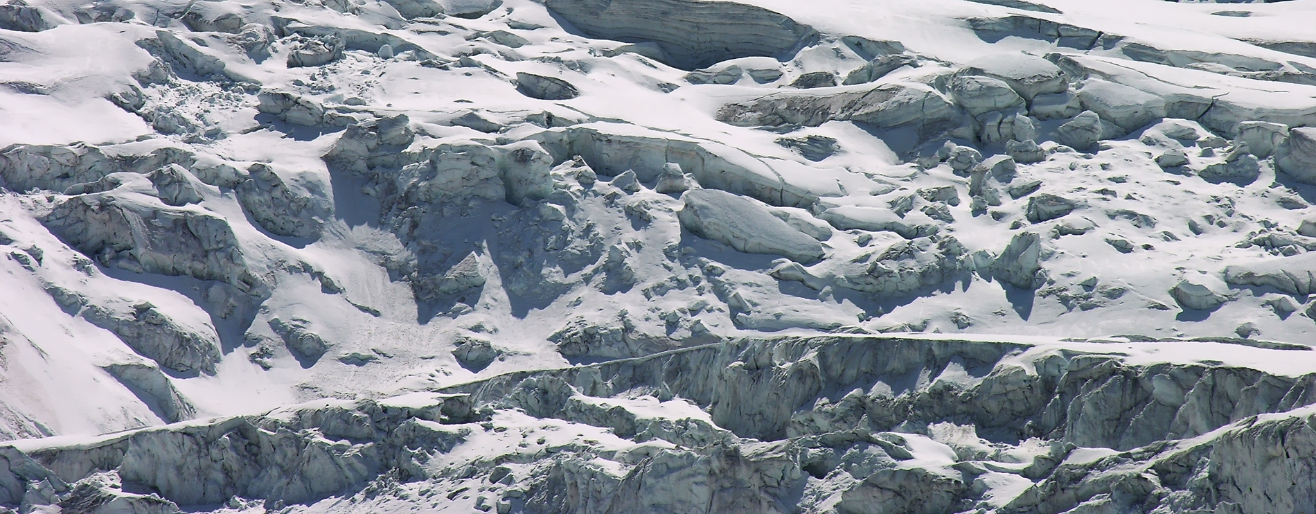 Il Ghiacciaio della Tribolazione - Alpi Graie - Italy